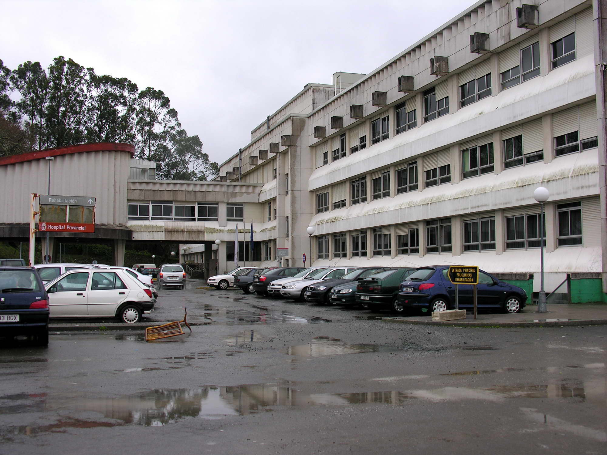 self made Conxo, Santiago de Compostela, Galicia, Spain